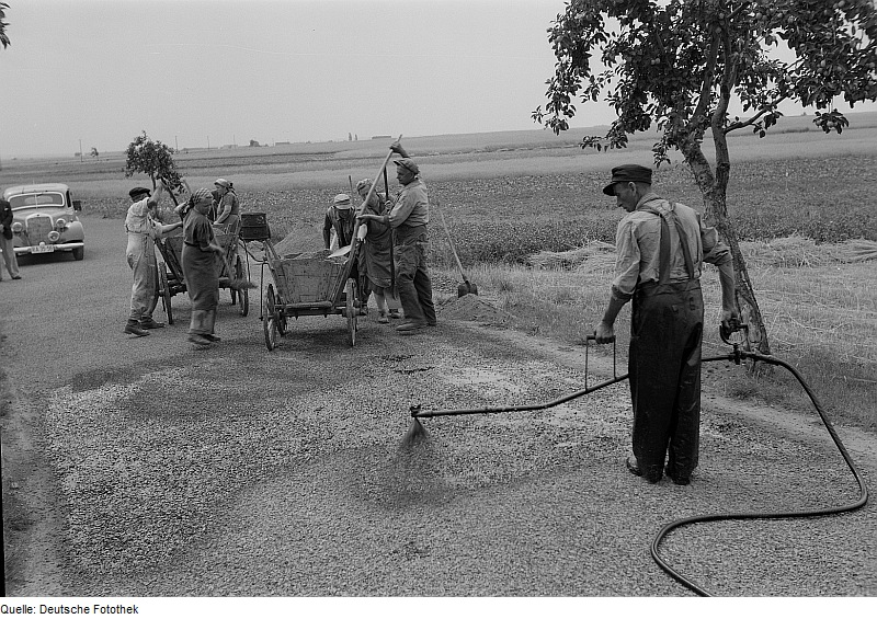 Original image description from the Deutsche Fotothek Straßenbau. Herstellen einer Straßendecke